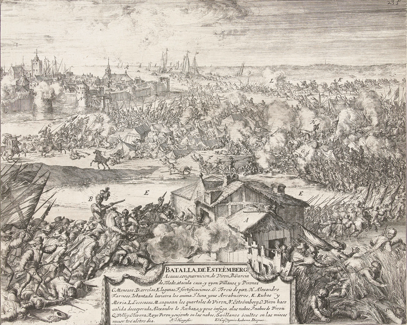 Slag in de buurt van Steenbergen en Halteren, bij Bergen op Zoom, 17 juni 1583. Middenonder een cartouche met de titel en de legenda A-S in het Spaans.